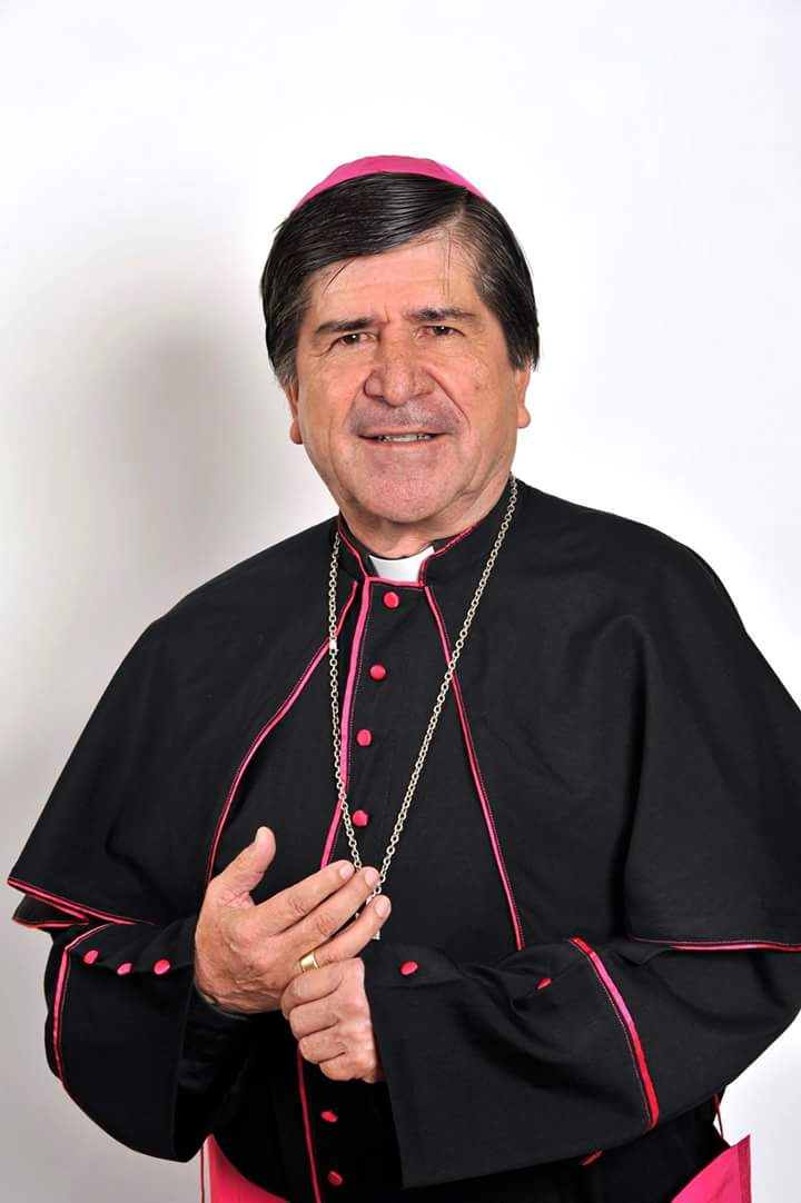 IV obispo de Ciudad Victoria